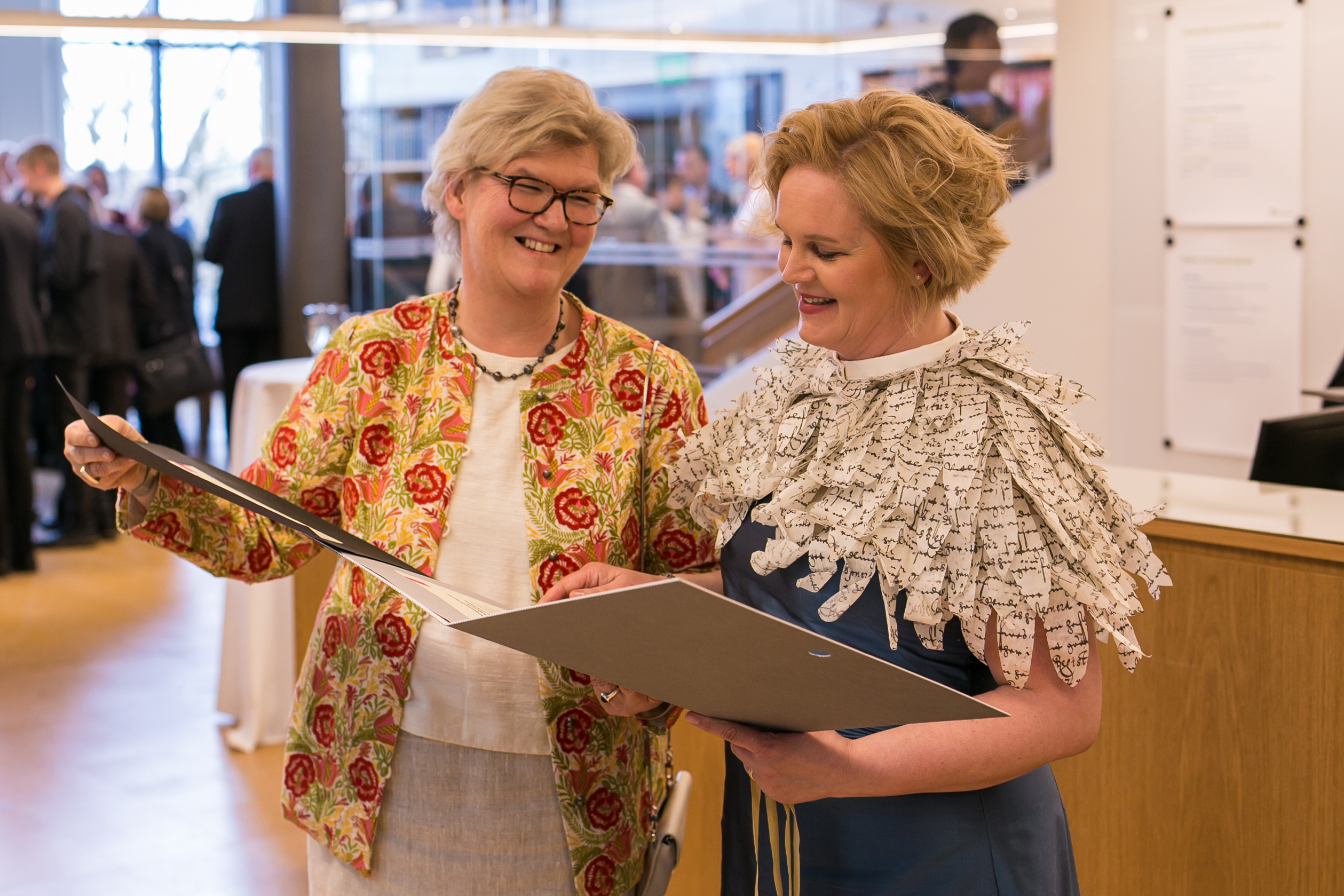 Sveriges riksbibliotikarie Gunilla Herdenberg i samspråk med Sveriges riksarkivarie Karin Åström Iko i samband med att Kungliga Biblioteket överlämnade medeltida pergamentsomslag till Riksarkivet. Från Riksarkivets 400-årsjubileum i Stockholm.